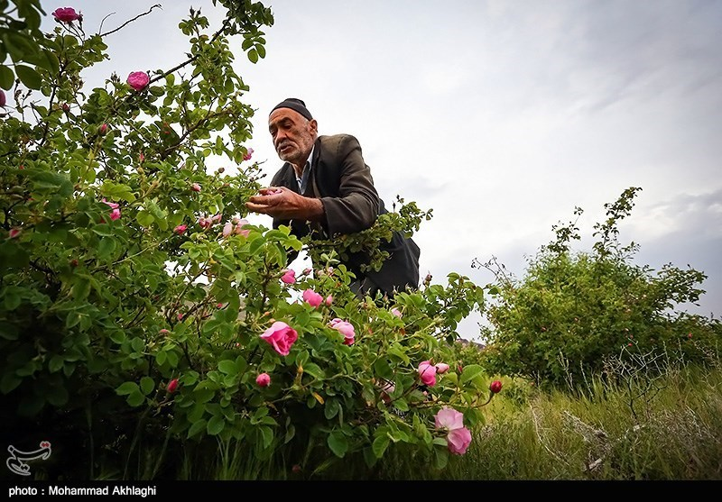 گلابگیری در قمصر کاشان